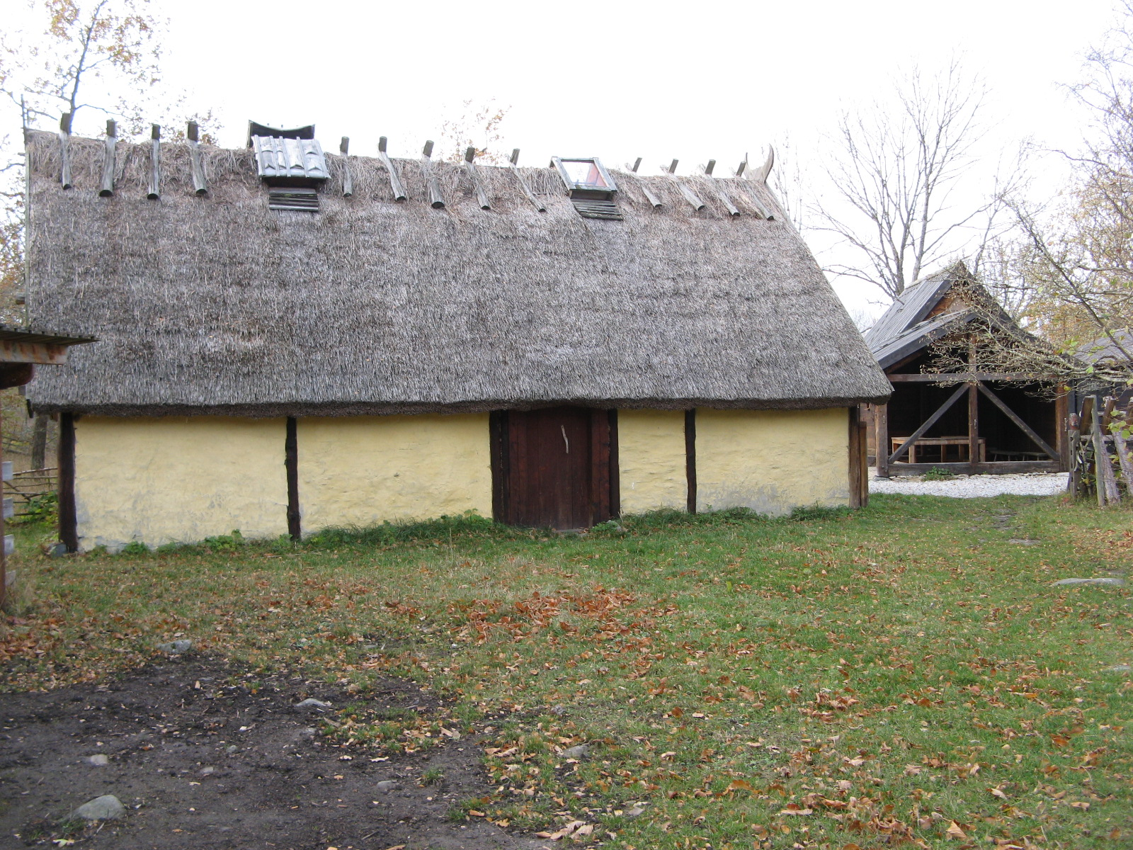 Lägerskolan Stavgard hus med halmtak